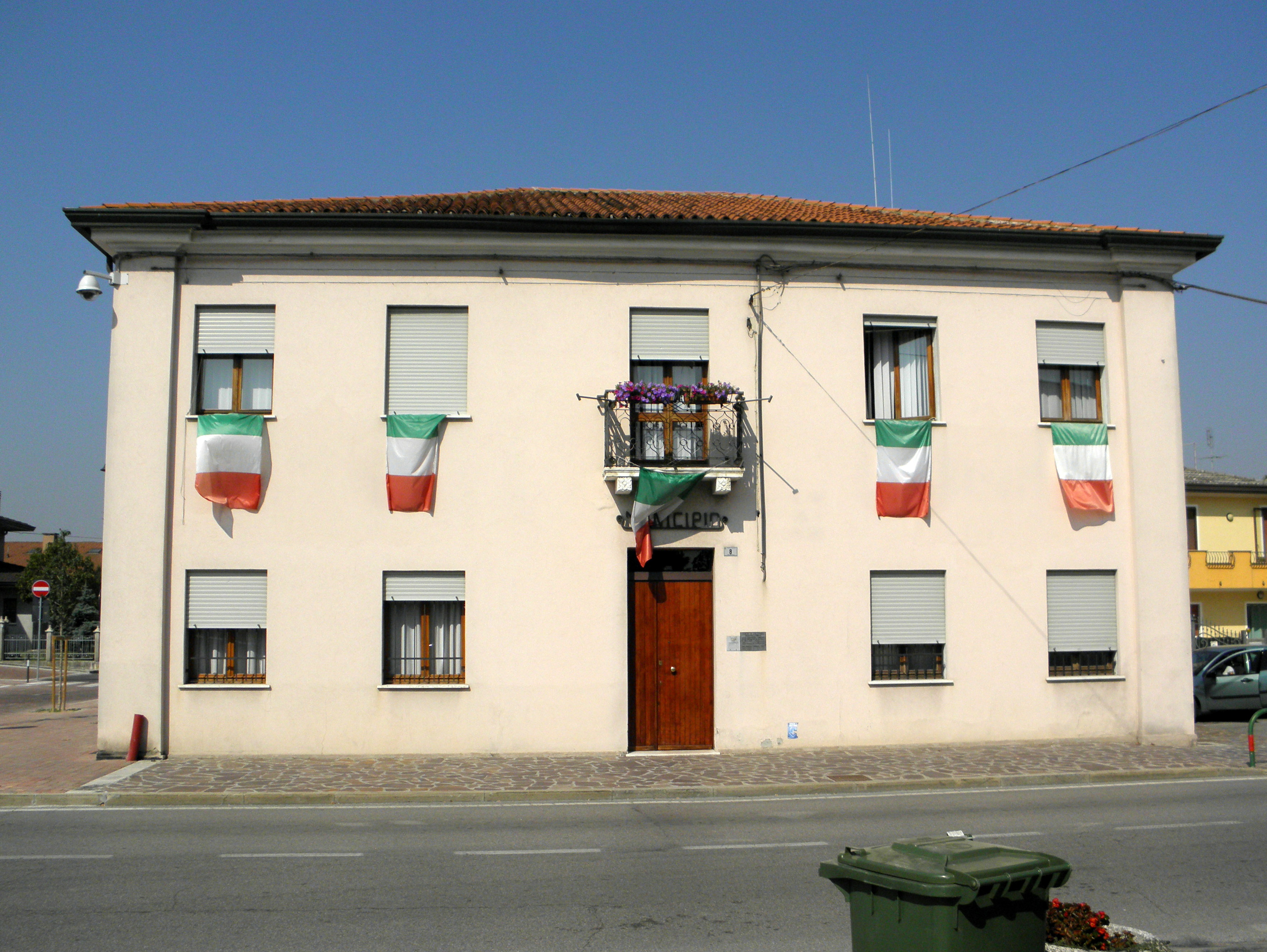 Polverara: la palazzina sede del municipio.